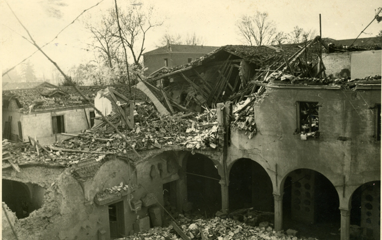 La sede del museo Bailo dopo i bombardamenti della seconda guerra mondiale